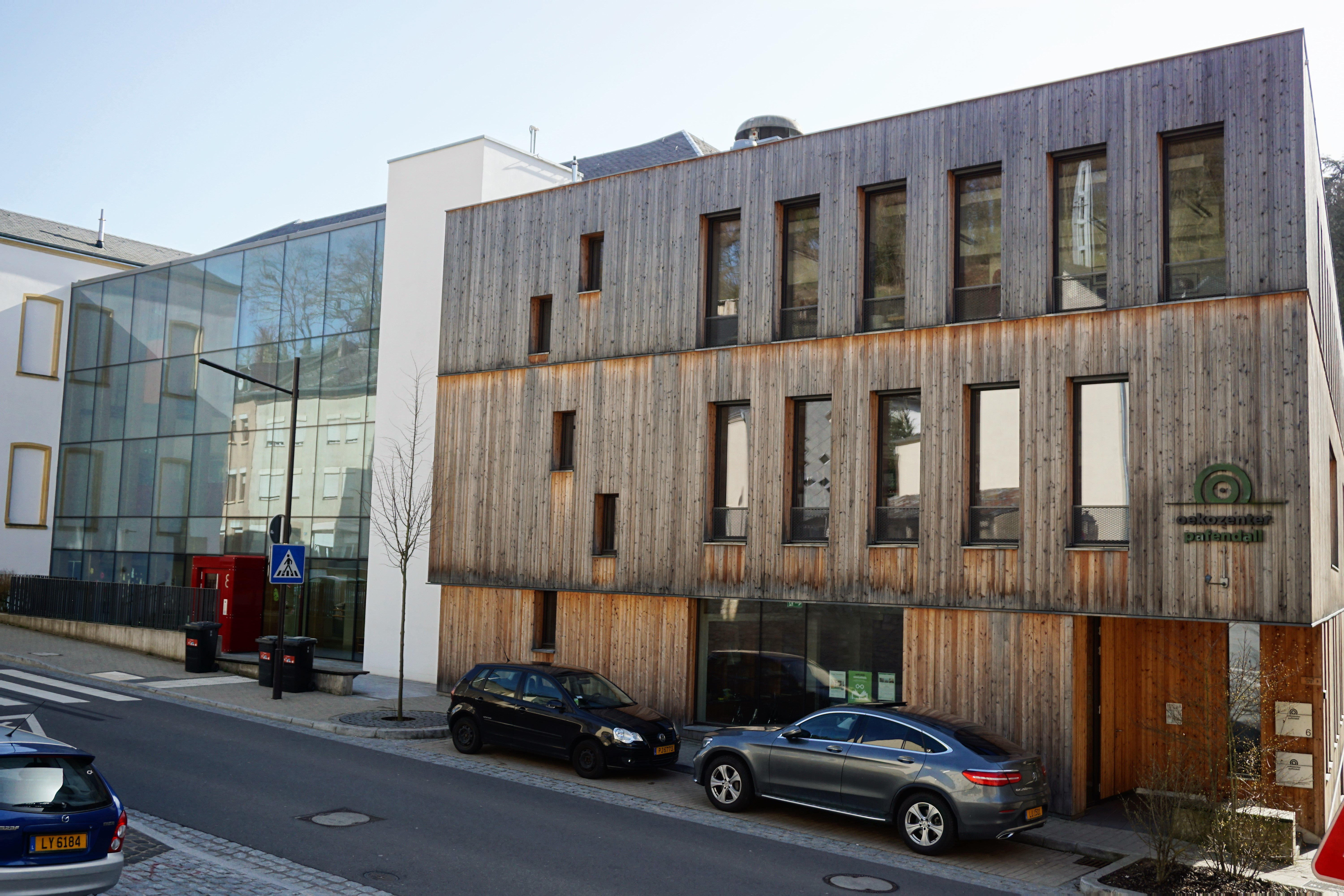 Luxembourg, quartier du Pfaffenthal: siège du "Oekozenter Lëtzebuerg"